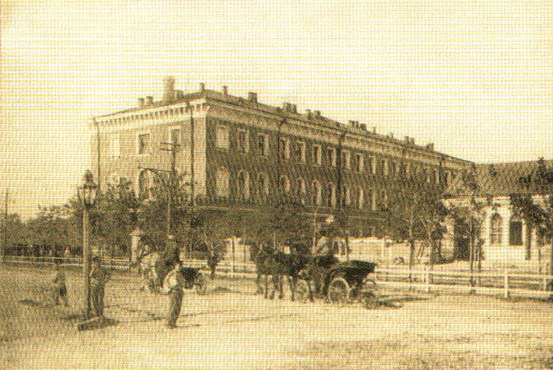 Театральна площа міста Єлизаветграда (Кіровоград), поч. ХХ століття